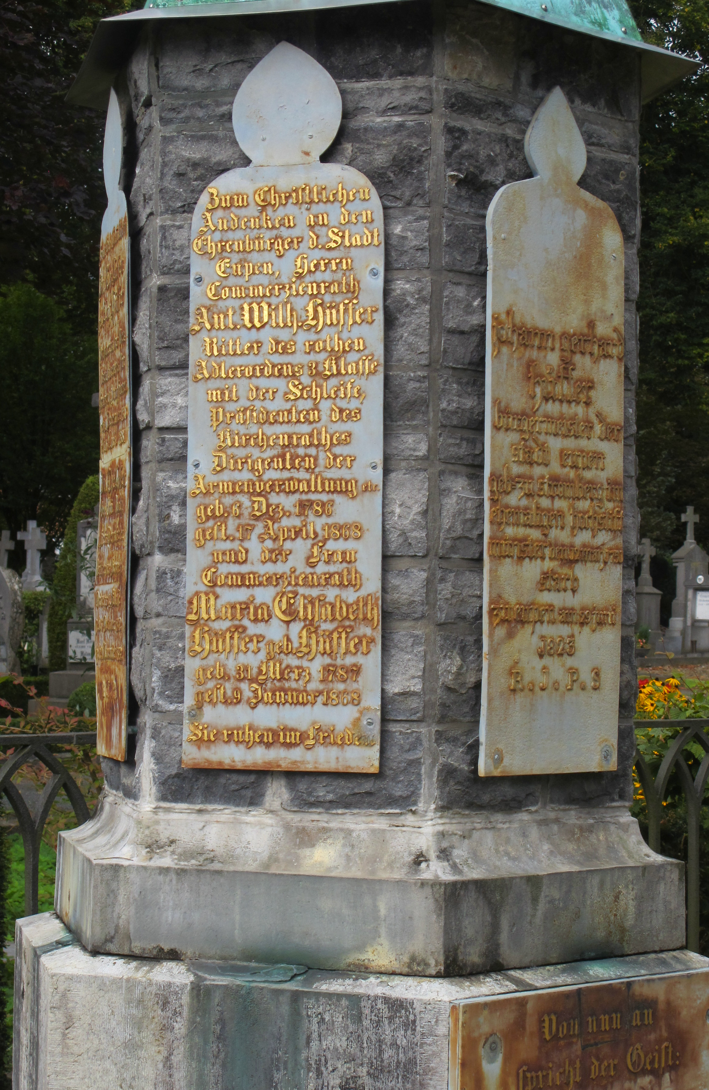 Grabplakette des Anton Wilhelm Hüffer am Familiengrab auf dem Friedhof in Eupen Belgien.